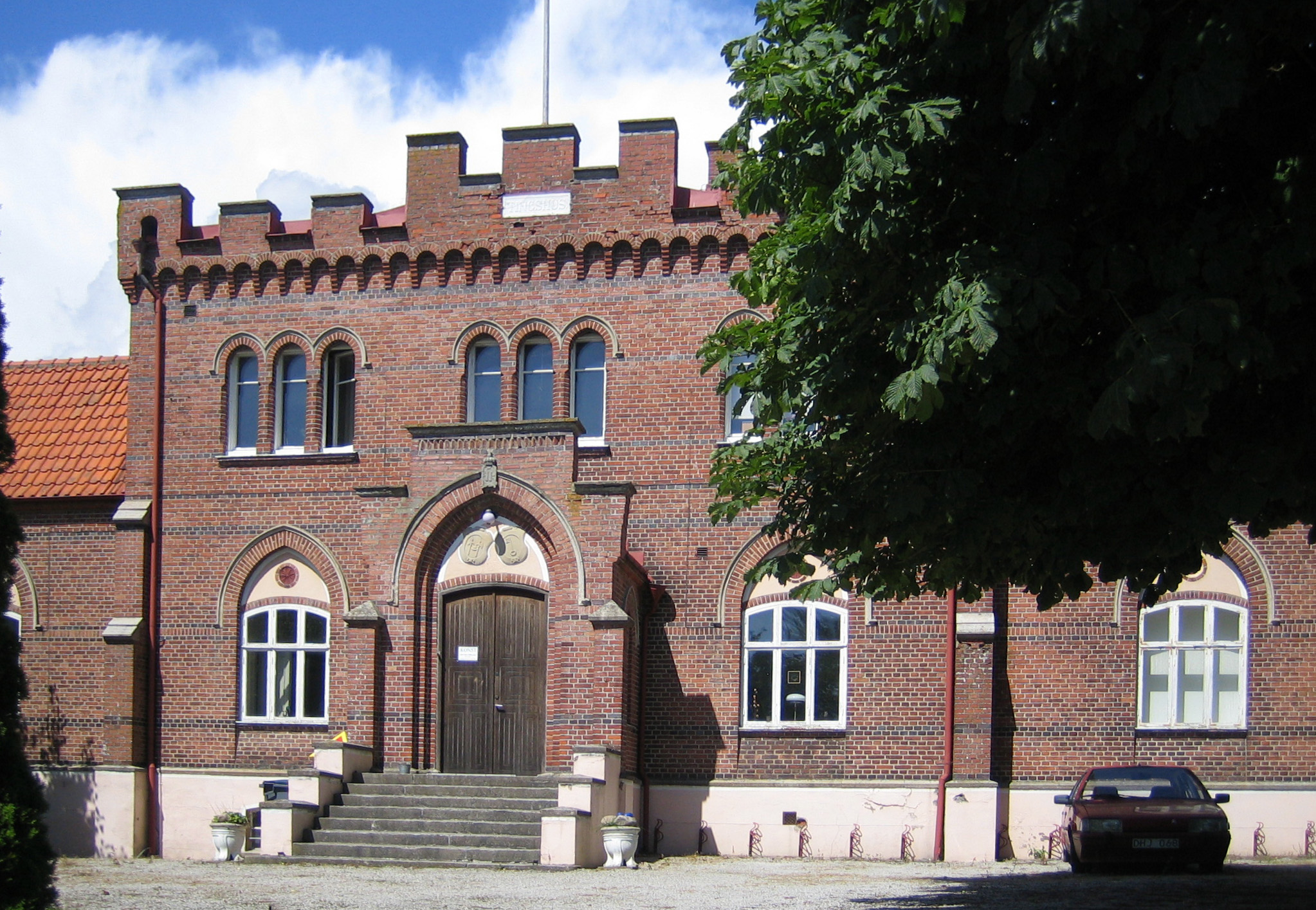 Old court house in Hammenhög, Sweden